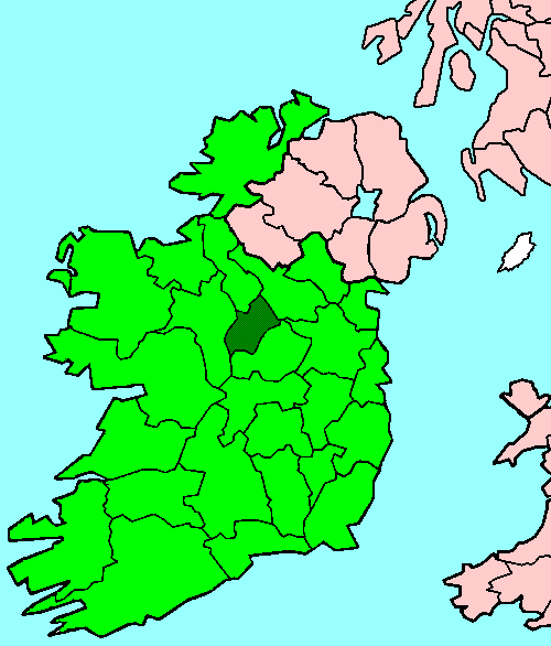 Longford